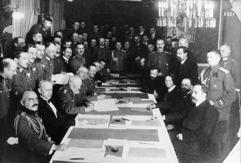 Brest-Litowsk, Waffenstillstandsabkommen Zentralbild, I. Weltkrieg 1914-18 Die Unterzeichnung des Waffenstillstandsabkommens zwischen Deutschland und seinen Verbündeten und Rußland am 15.12.1917 in Brest-Litowsk. UBz: Der Oberbefehlshaber der Ostfront Generalfeldmarschall Leopold Prinz von Bayern, links, bei der Unterzeichnung, rechts die Delegation Sowjetrußlands Leo Kamenew, Adolf Joffe und Anastasia Bitsenko. Abgebildete Personen: Von vorne: Hakki Pascha (Osmanisches Reich) von Merey (Österreich-Ungarn) Prinz Leopold von Bayern: 1846-1930, Prinz, Generalfeldmarschall, Deutschland General Hoffmann, Oberst Gawtschew (Bulgarien) Rechte Tischseite sitzend die sowjetrussische Delegation: Lew Kamenew Adolf Joffe Anastassija Bizenko Admiral Altfater Information added by Wikimedia users.